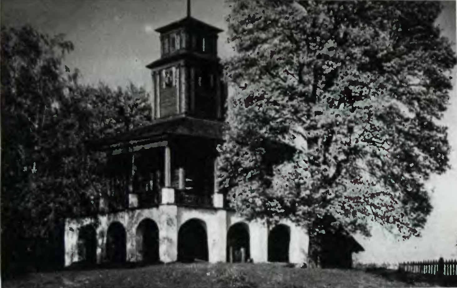 Беларуская (тарашкевіца): Чырвоны Двор (Čyrvony Dvor), сядзіба Парчэўскіх (Parčeŭski)